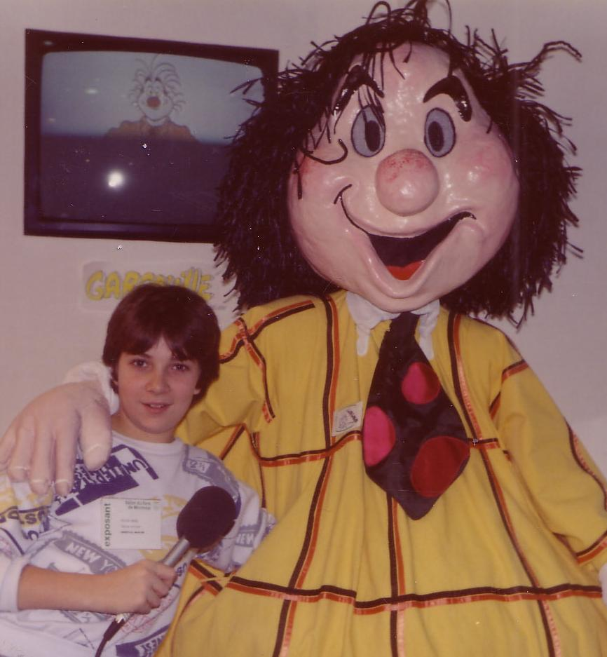 Tristan Demers dans ses débuts